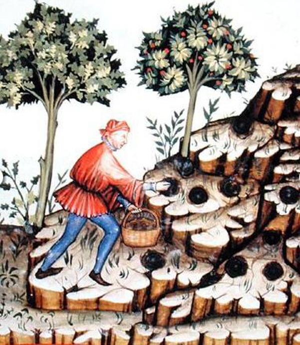 Terra tufule tubera miniature du XVe s